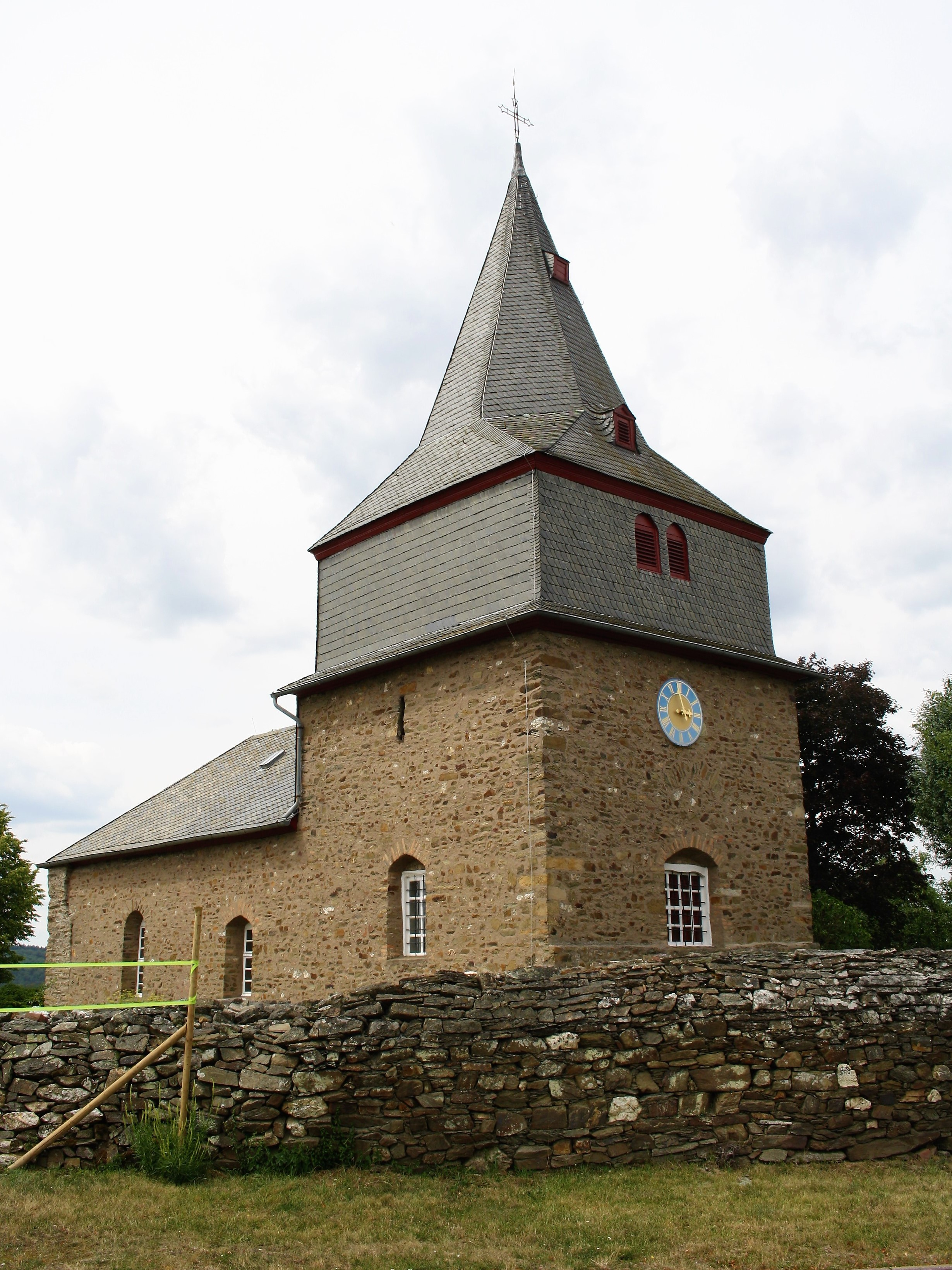 Evangelische Wehrkirche in Dickschied, einem Ortsteil von Heidenrod im Rheingau-Taunus-Kreis in Hessen.